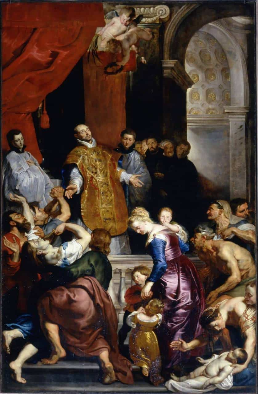 Quadro che ritrae Sant’Ignazio in atteggiamento mistico, con le braccia spalancate a chiedere l’intercessione del Signore. È accompagnato da alcuni membri del suo ordine e davanti a lui ha una serie di figure che fanno riferimento ai suoi miracoli.